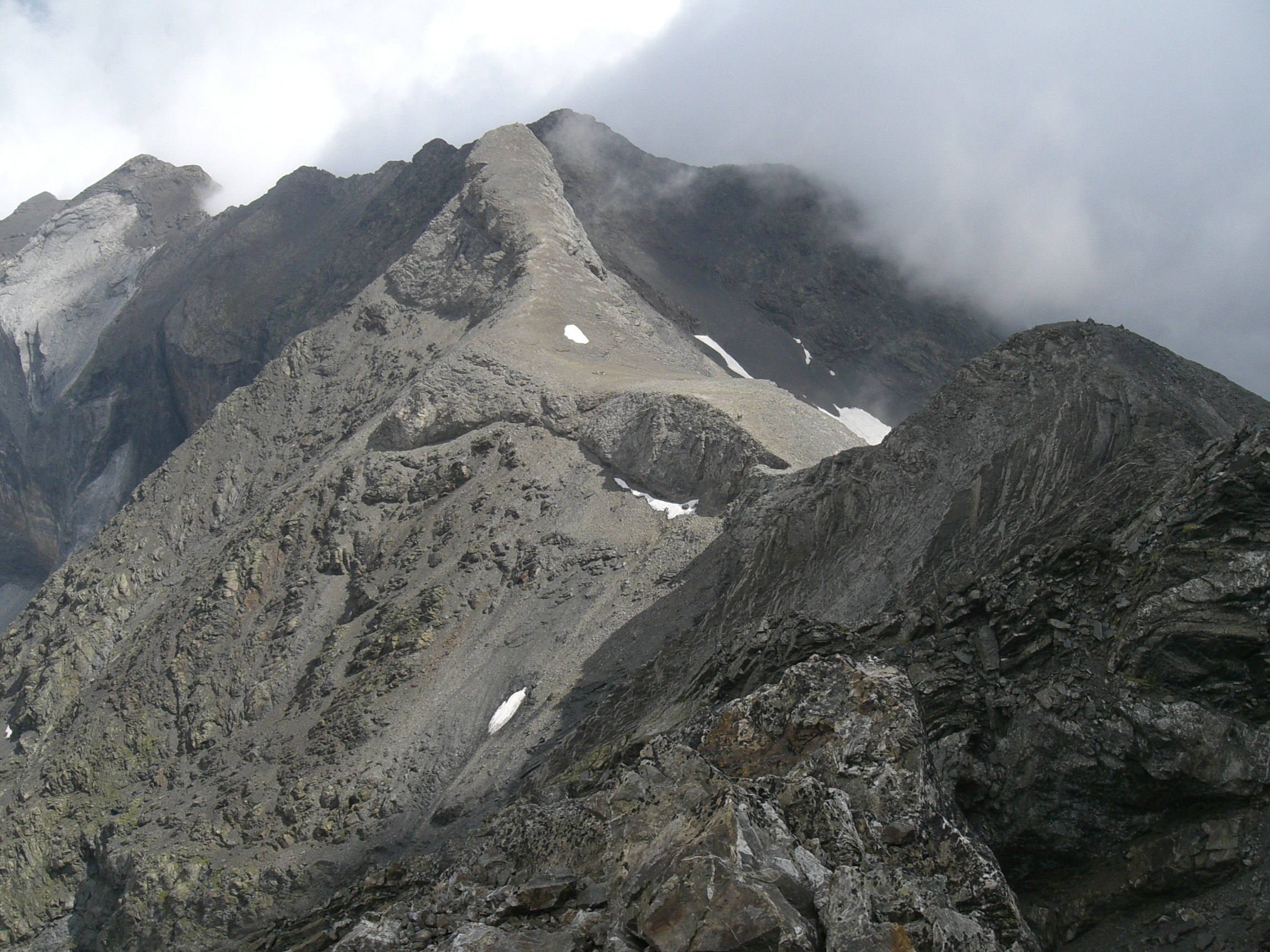 Pic de serre Mourène vu depuis le pic de la Munia